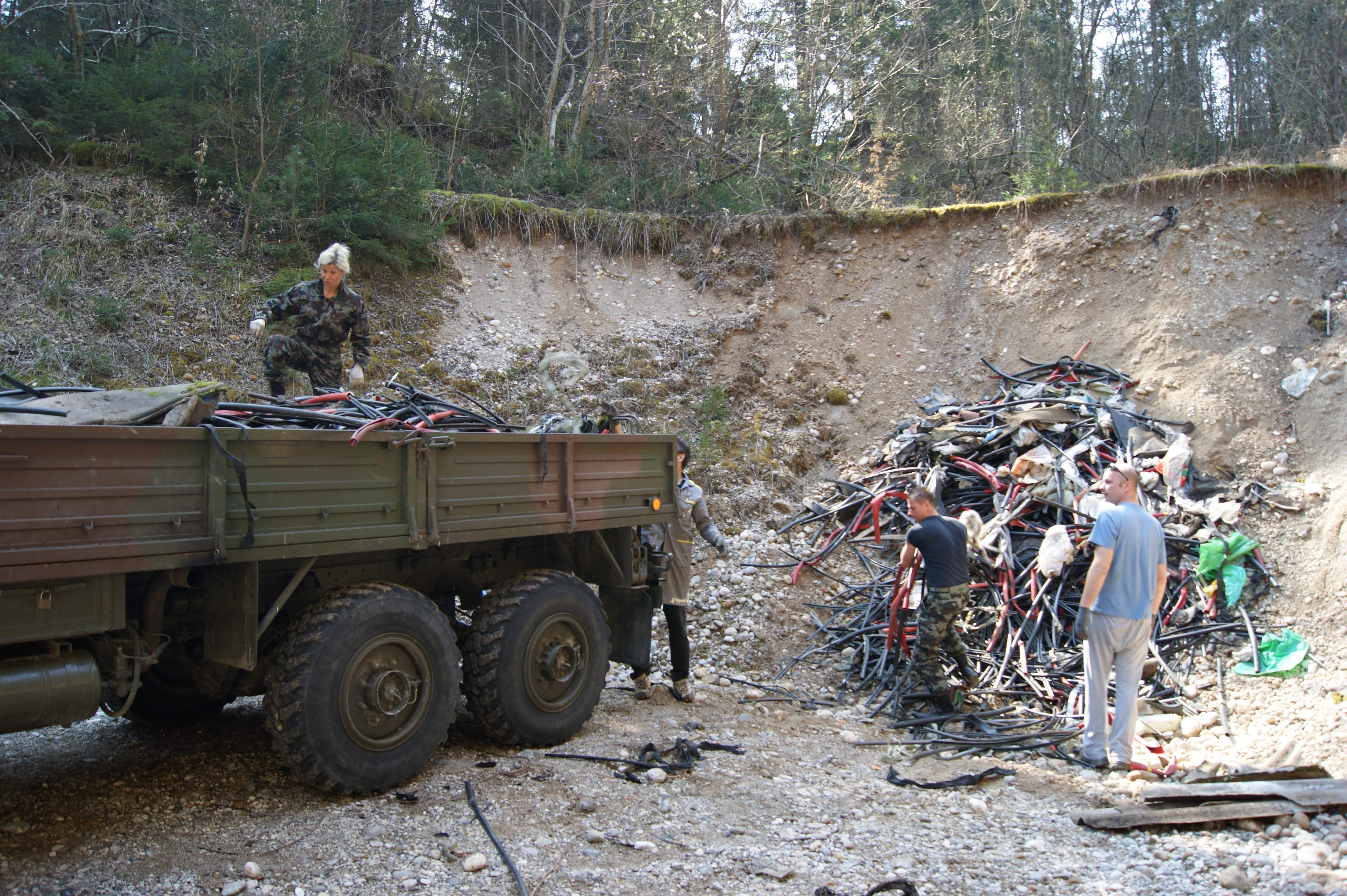 Slovenska vojska v okoljski akciji Očistimo Slovenijo 2012